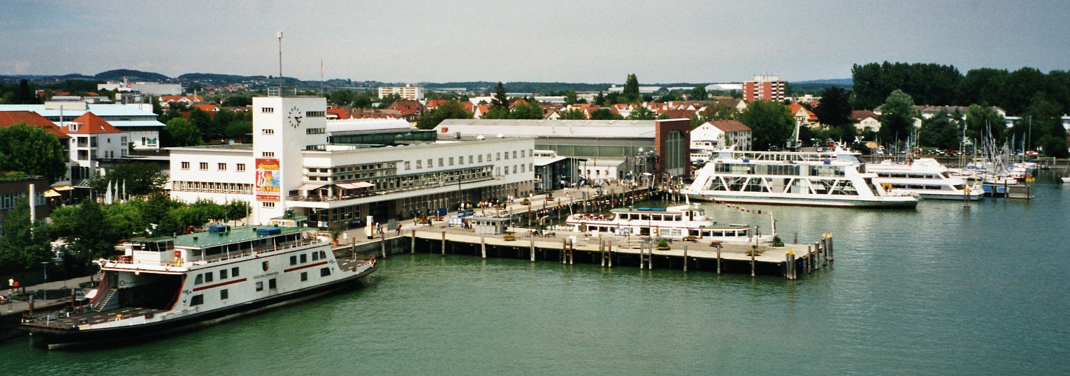 Hafen und Zeppelinmuseum Friedrichshafen